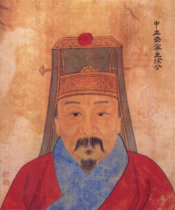 徐達（1332年－1385年），字天德，濠州鍾離永豐鄉（今安徽鳳陽東北）人，明朝開國功臣。元朝末年，徐達參加了朱元璋軍隊，追隨其擊敗陳友諒、張士誠，朱元璋任為左相國。至正二十七年（1367年），任征虜大將軍，與副將軍常遇春一起北伐中原，攻占元大都。此後又連年出兵打擊北元勢力。官至中書省右丞相，封魏國公。同時也是明成祖朱棣的岳父。死後，朱元璋追封其為中山王。